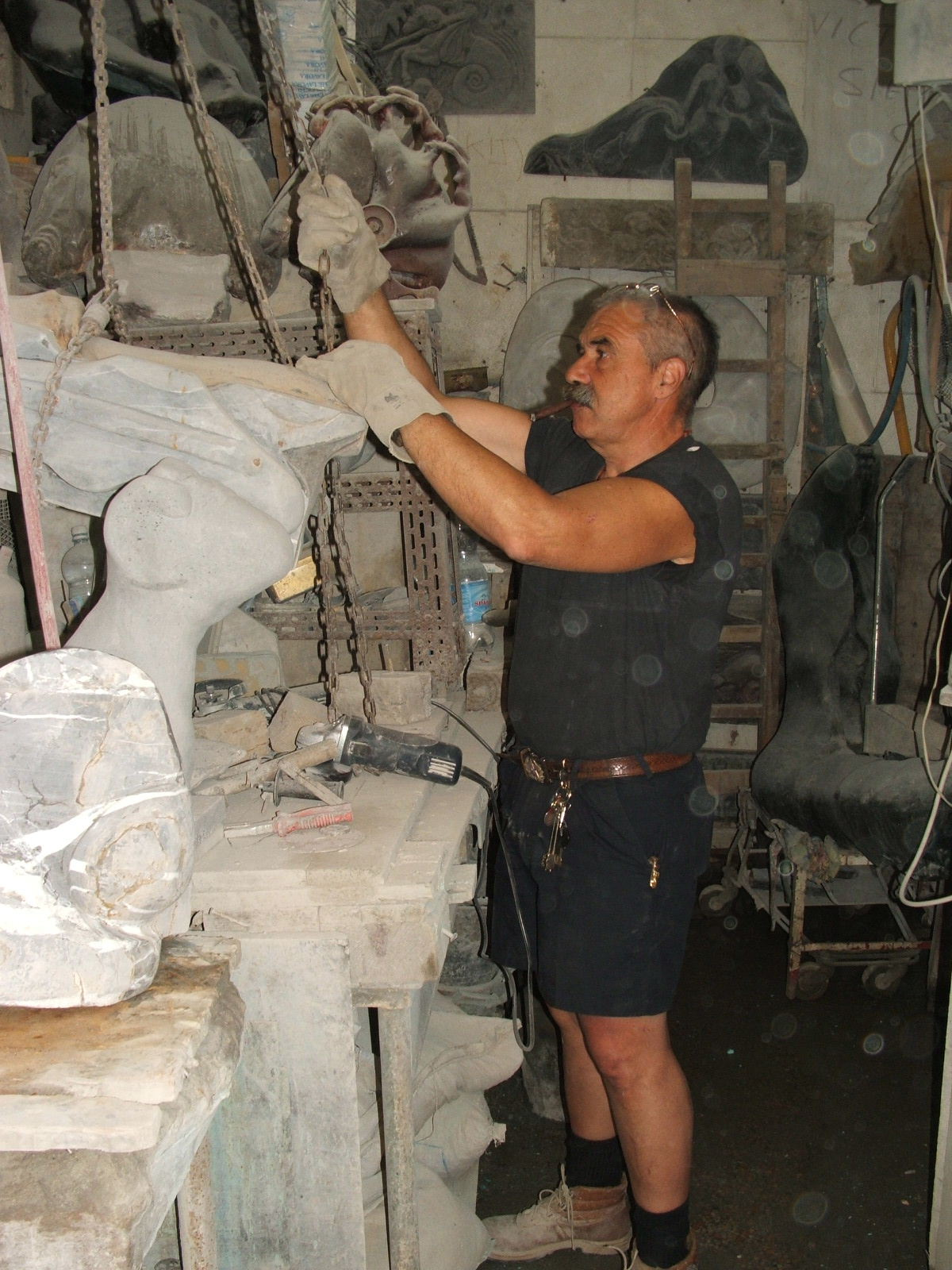 Genova, immagine dal laboratorio dello scultore genovese Alfonso Gialdini Lo scultore all'opera nel suo laboratorio